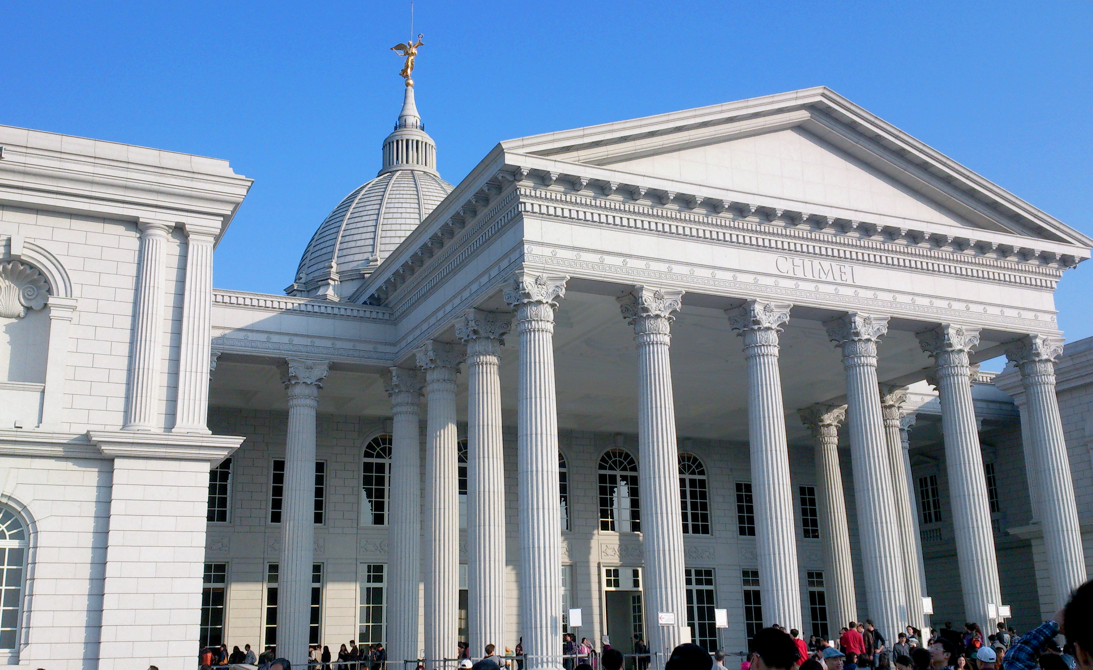 Chimei museum1